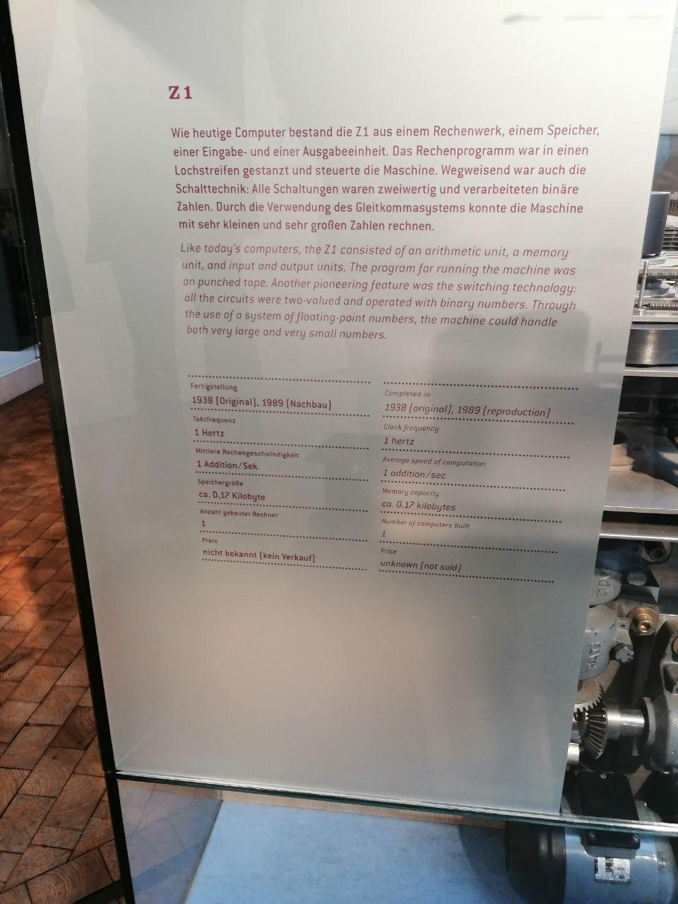 Описание в немецком техническом музее